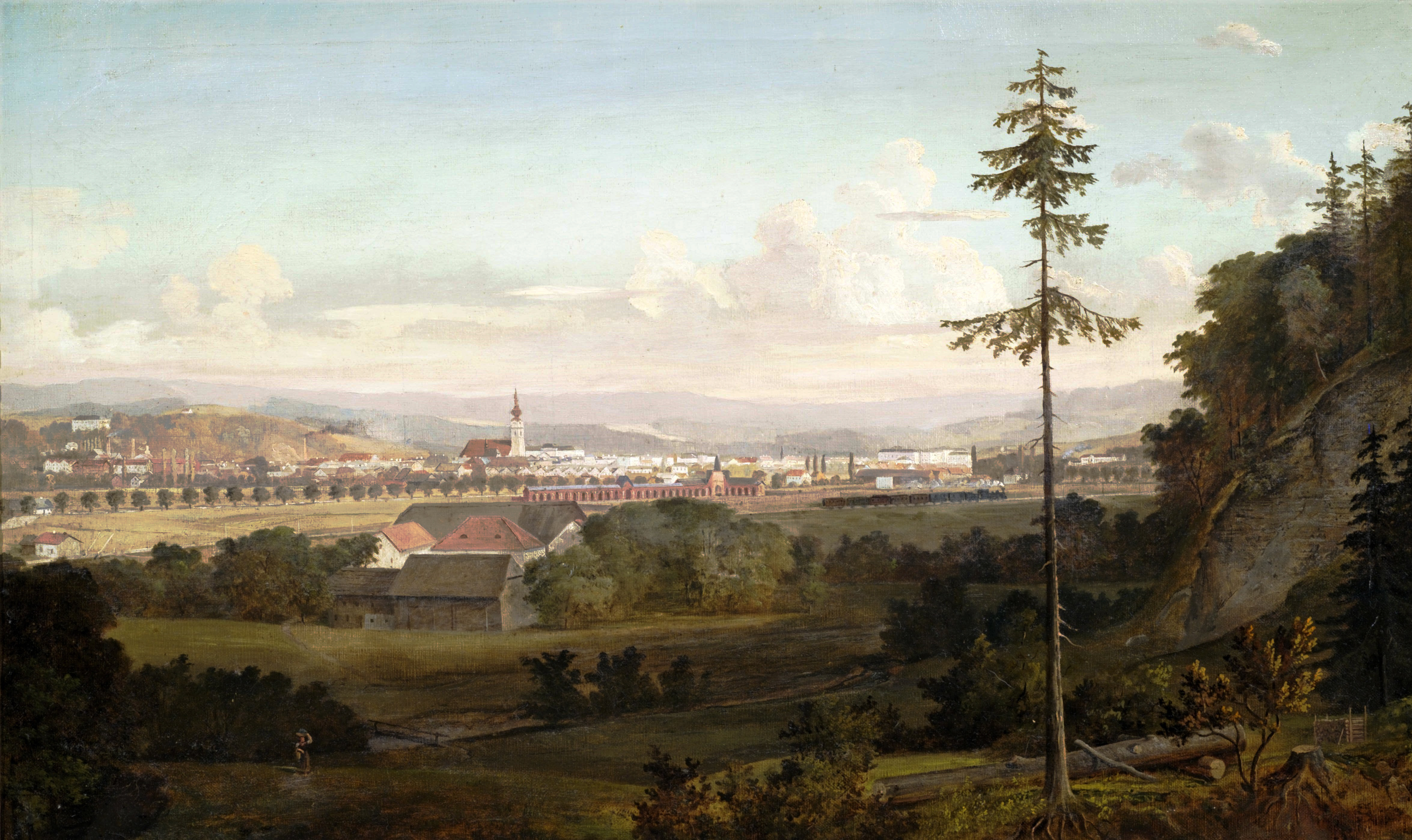 Ried im Innkreis. Öl auf Leinwand, rückseitig bezeichnet. 44 x 70 cm